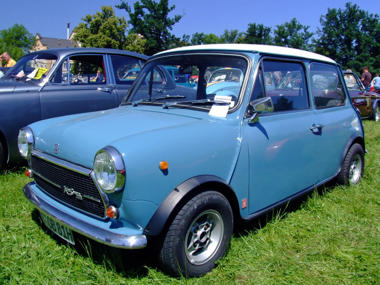 Quelle: selbst fotografiert, 06/2007 Fotograf: Späth Chr.